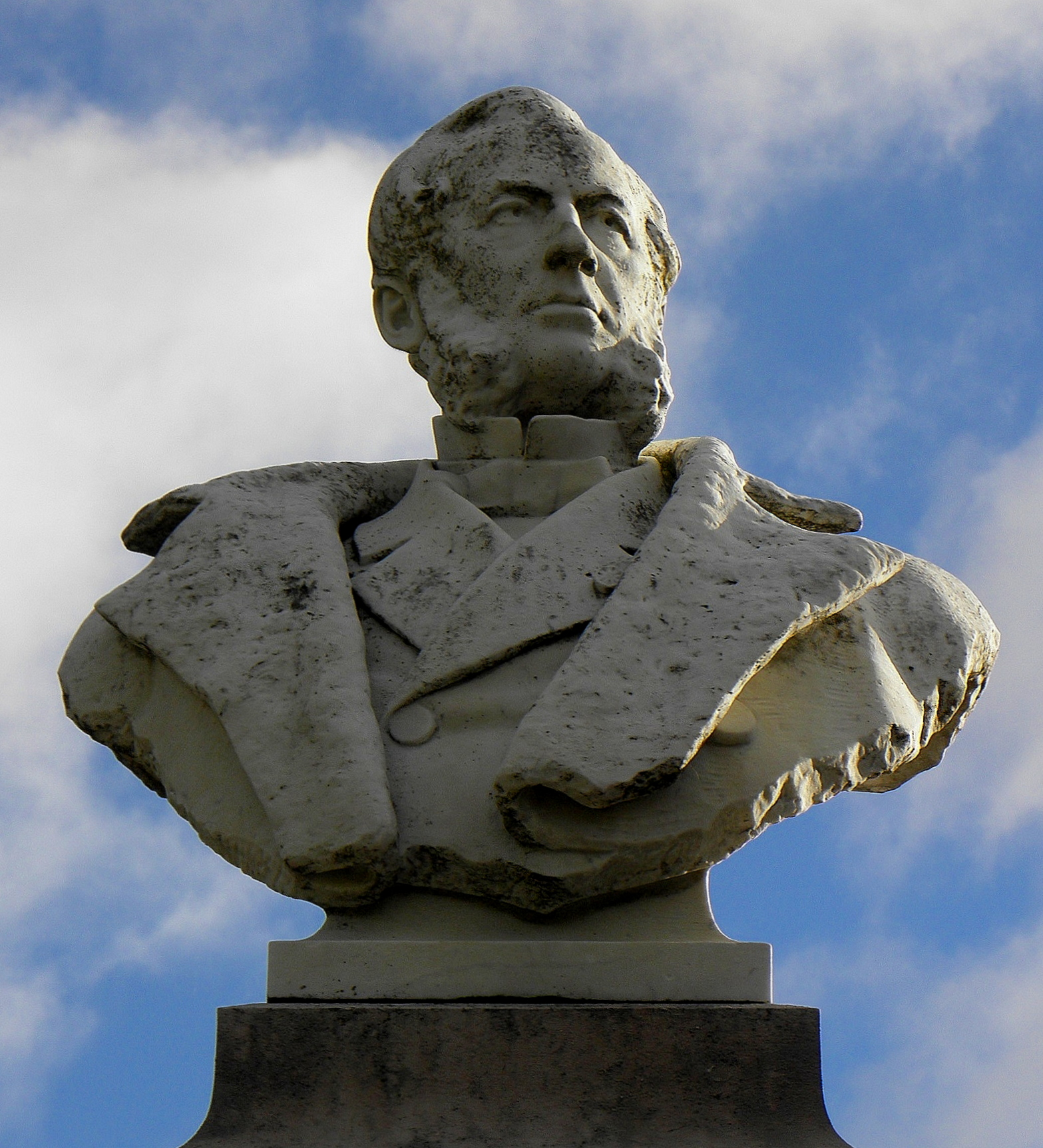 Monument à Émile Menier à Noisiel (77).